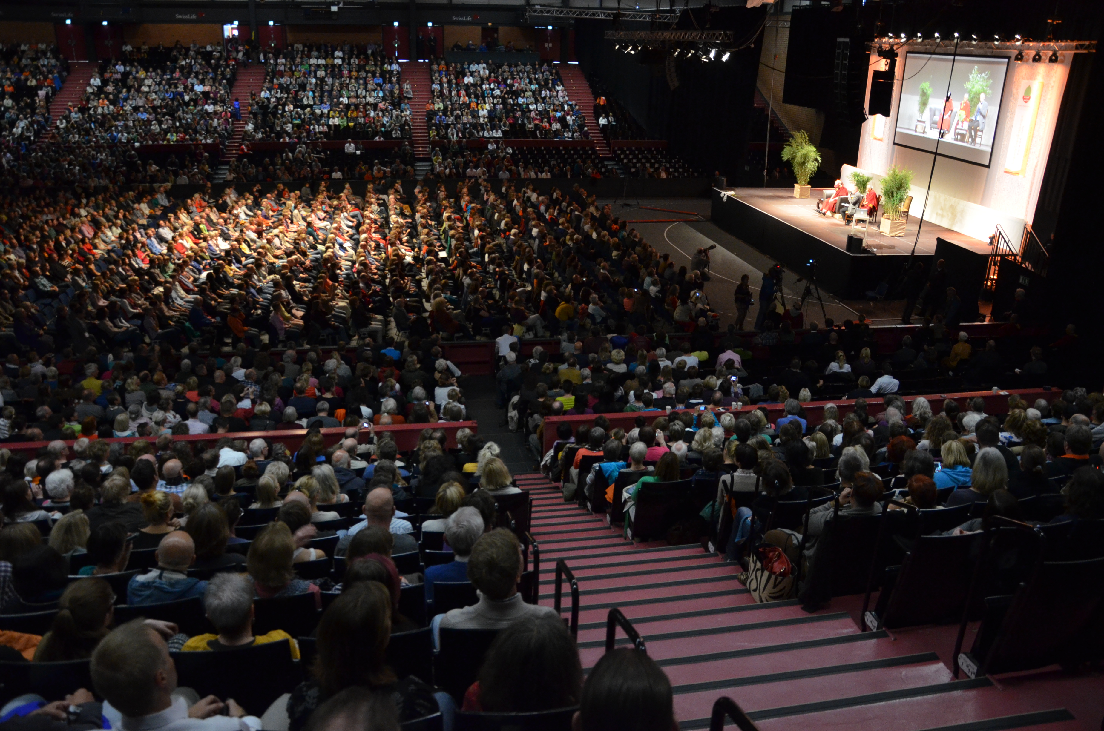 Der 14. Dalai Lama, Tenzin Gyatso, zugunsten des Hilfsprojektes future4children in der Swiss Life Hall in Hannover...